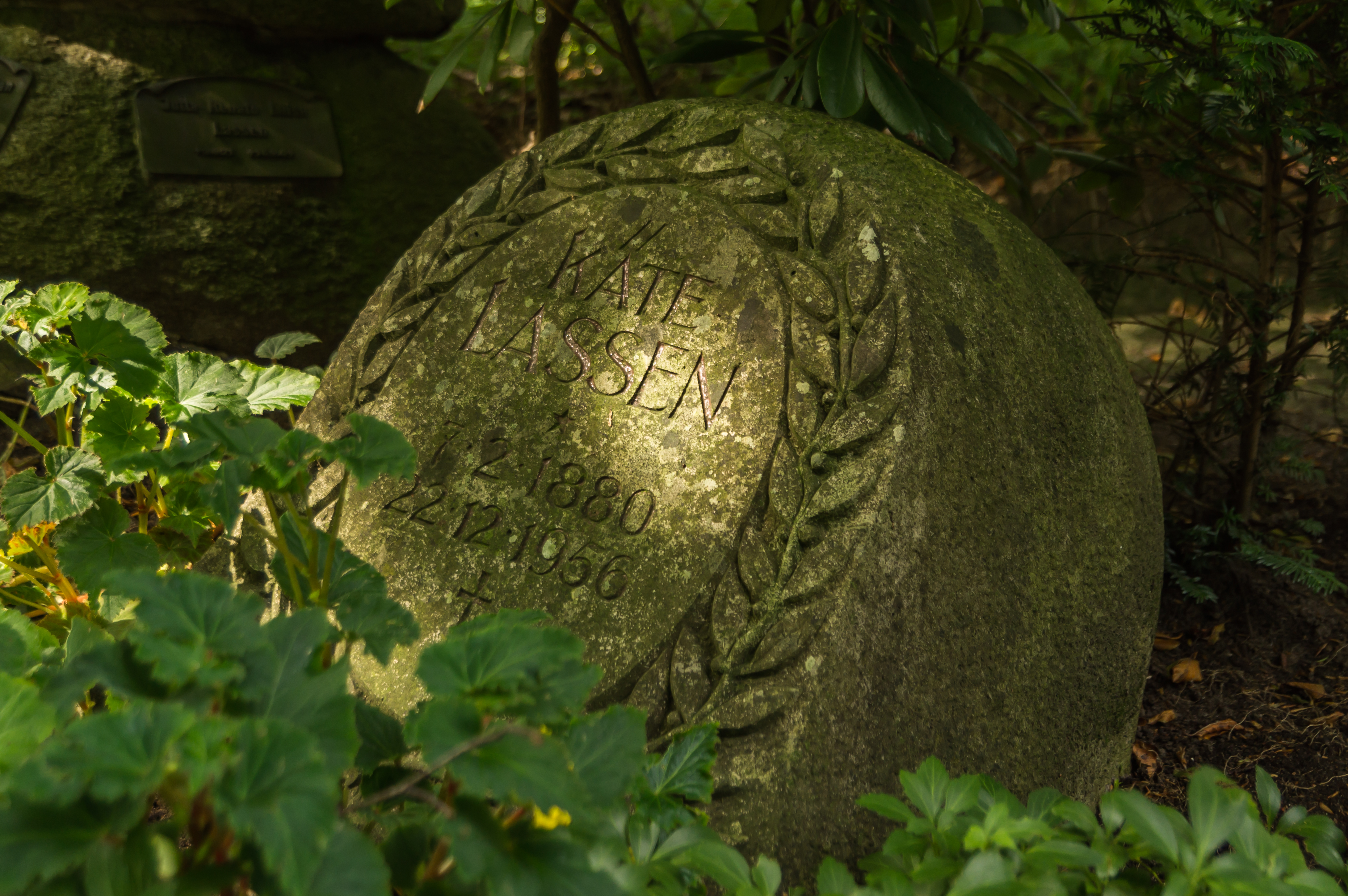 Flensburg-Friedenshügel; Grabmal Kaete Lassen